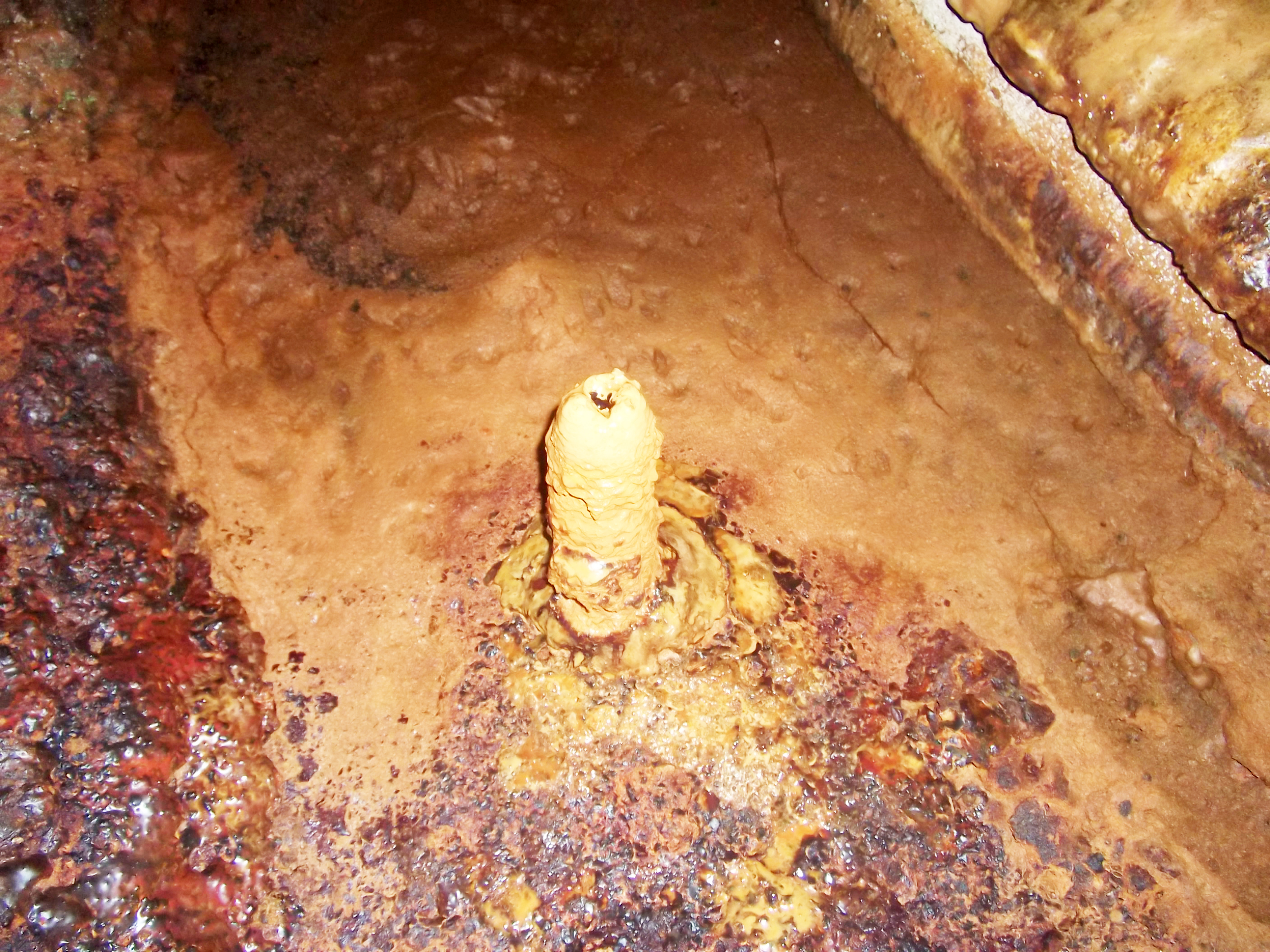 Gruta dos Balcões, formações geológicas, Estalagemite de lama, Biscoitos, Praia da Vitória, Terceria, Açores